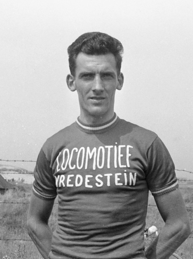 Nederlandse Wielrenners Tour de France . Voorting